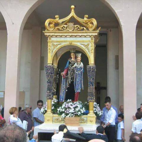 Trionfale uscita Maria SS. della Catena a Fiumefreddo di Sicilia